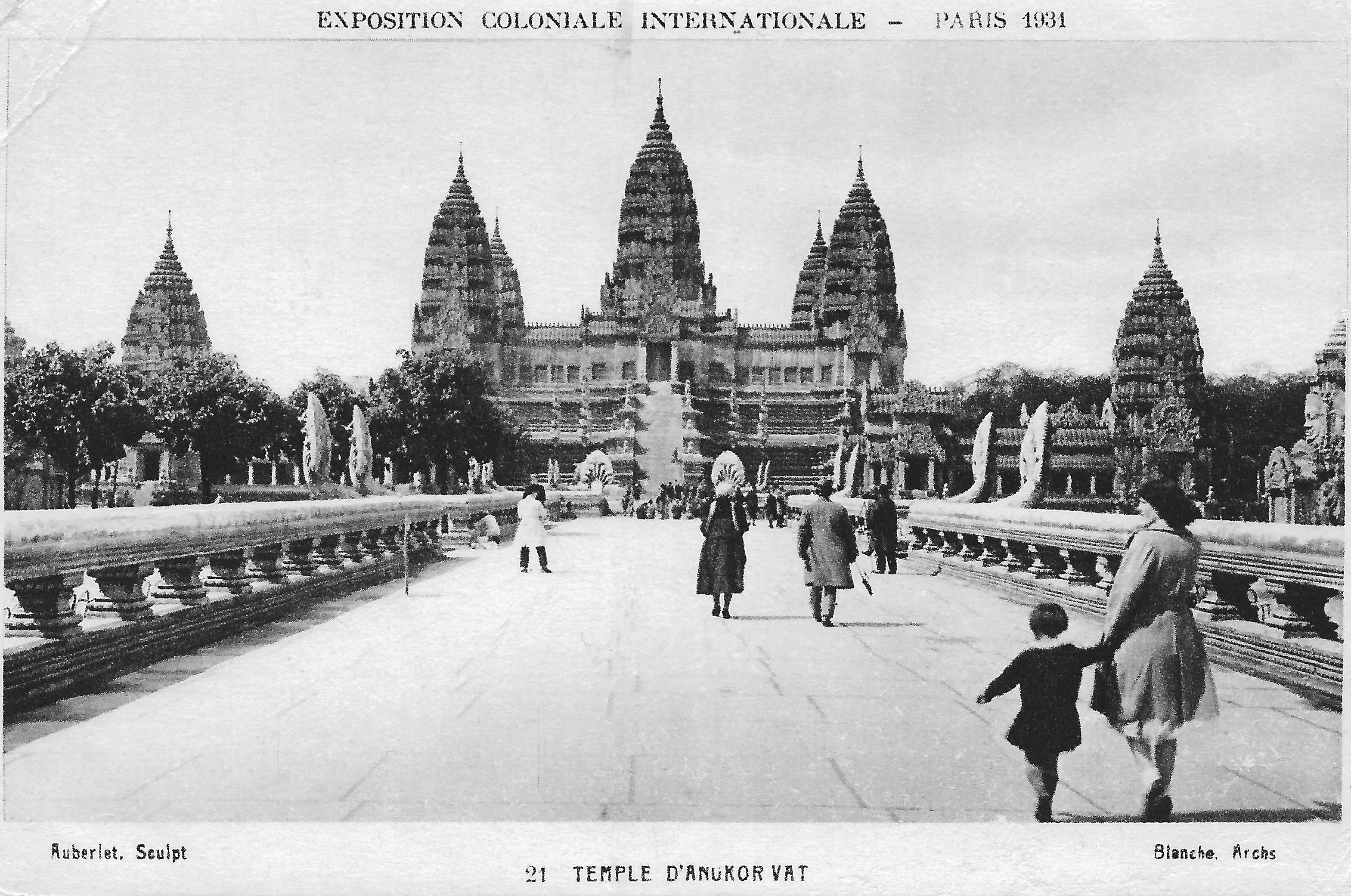 Briefkaart van de koloniale expositie van Parijs in 1931